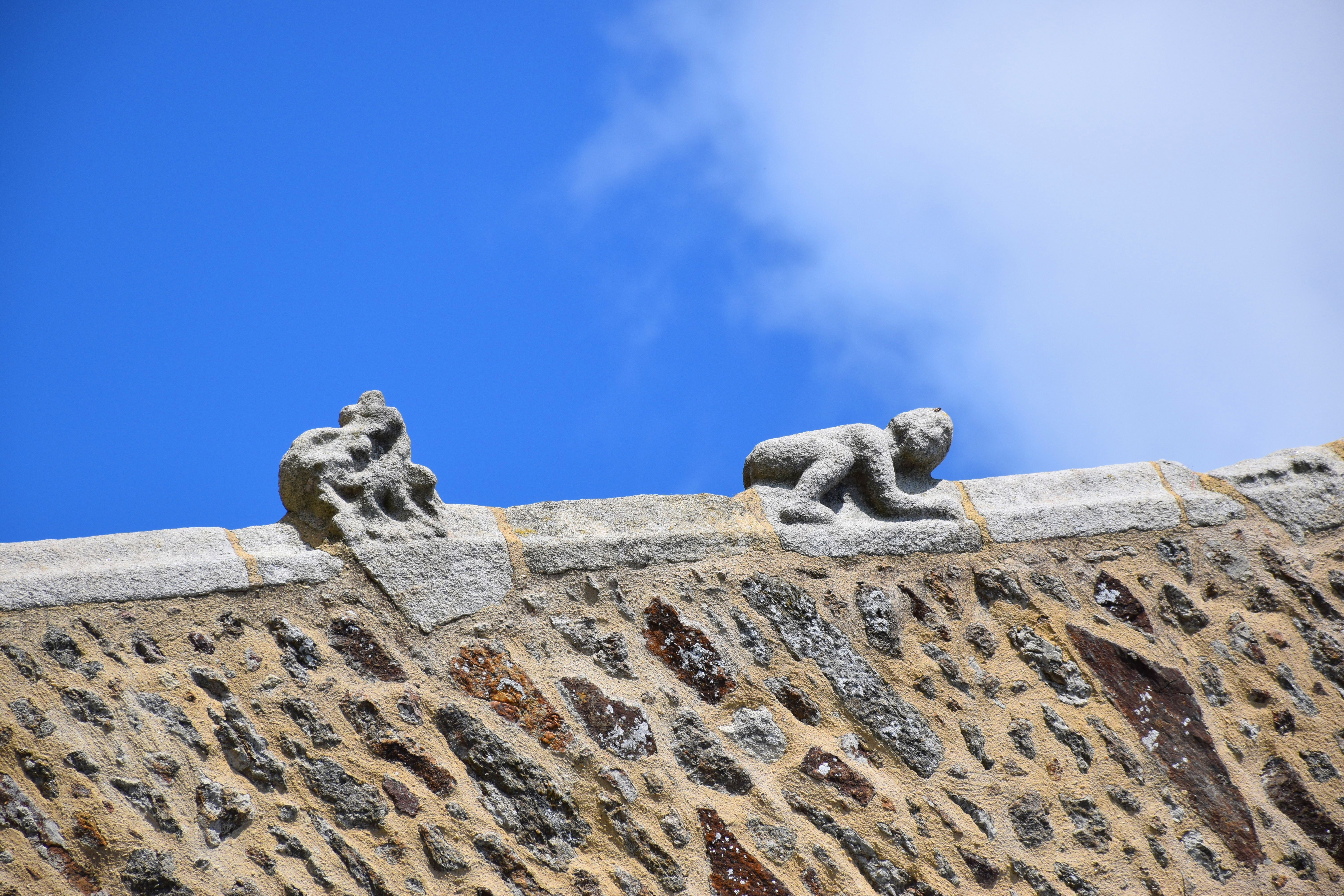 Taden - Curiosité (2)